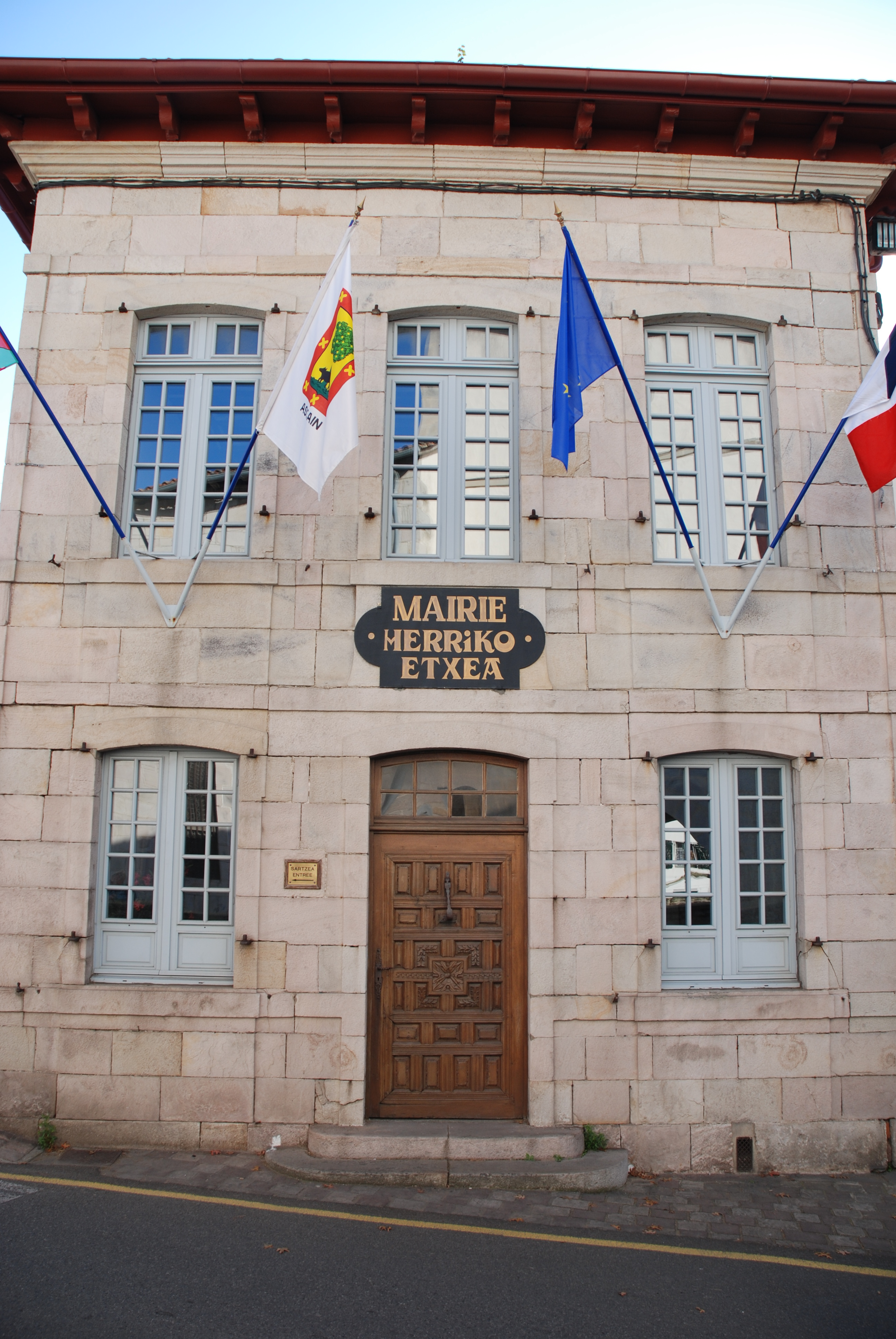 Ascain, l'hôtel de ville